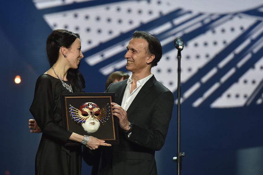 Премия Золотая маска - 2017 года